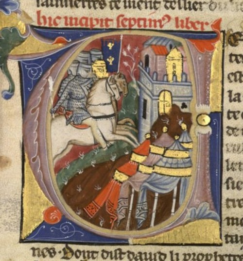 Siege of Jerusalem 1099